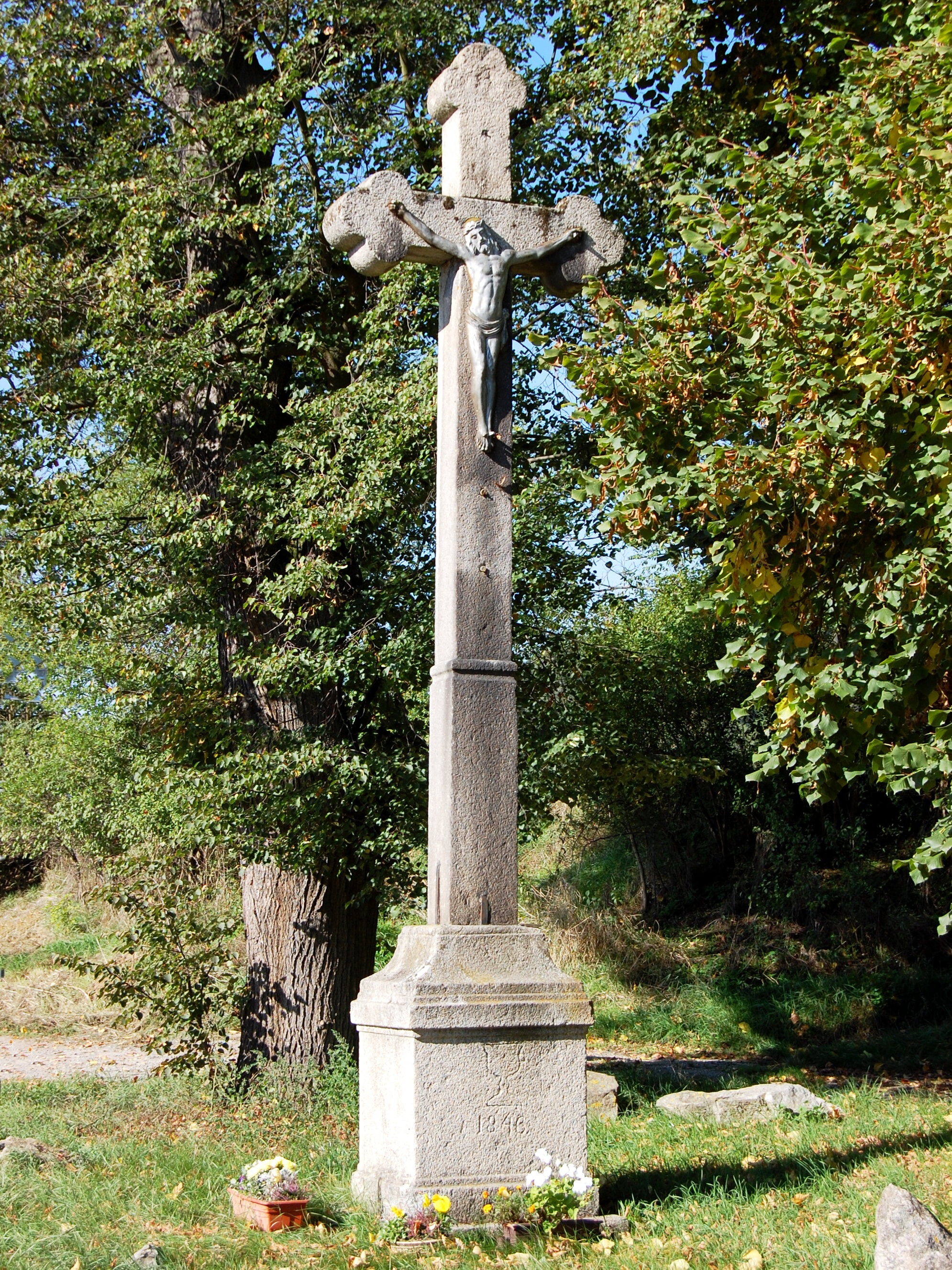 Krucifix z roku 1846 (Březina), u obce, Březina